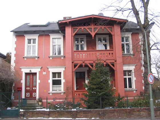 Haus in Kohlhasenbrück, Berlin-Wannsee